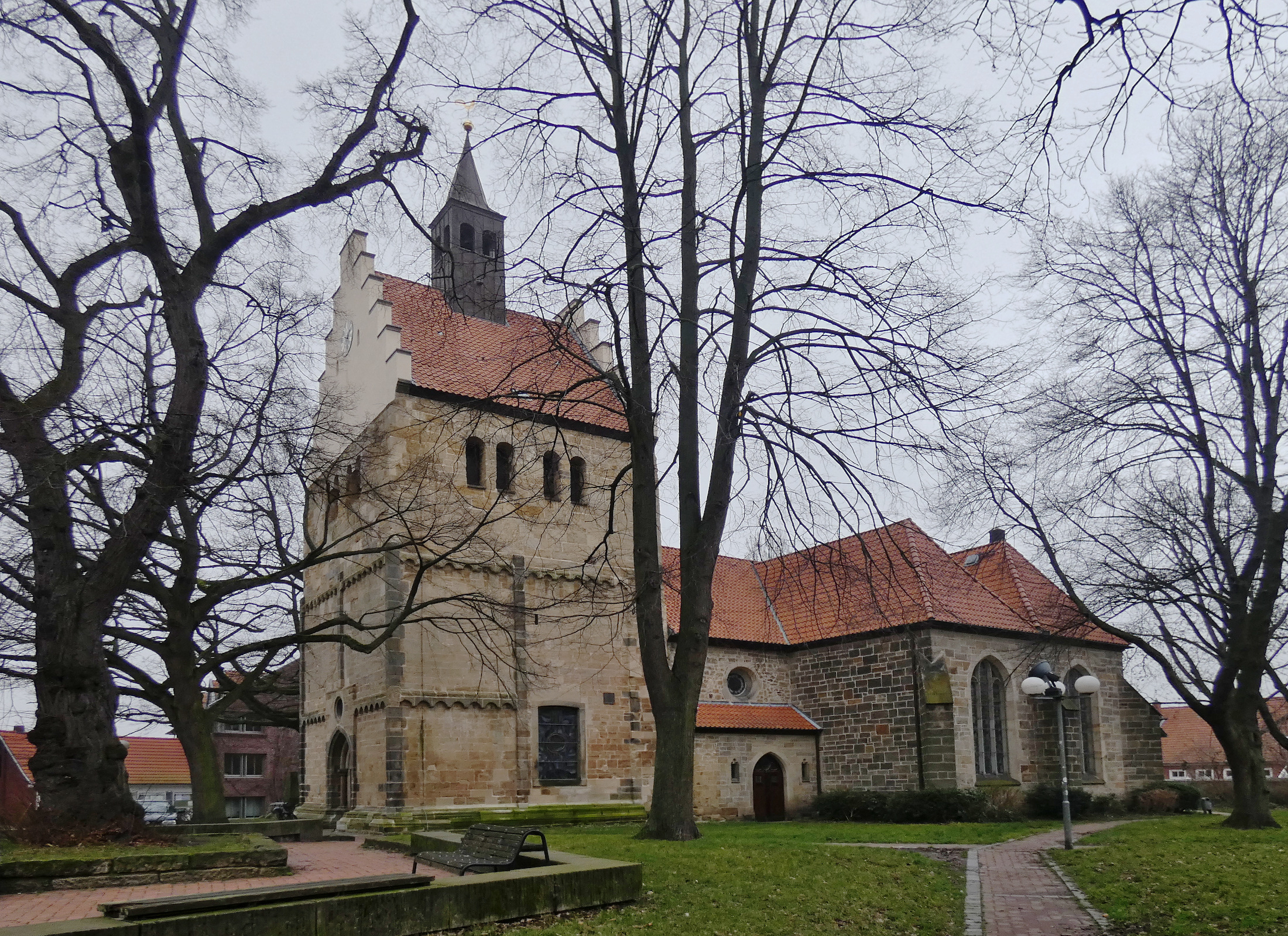 Südwestansicht der Margarethenkirche in Gehrden mit dem Westturm und rechts dem Anbau aus dem Jahr 1909.